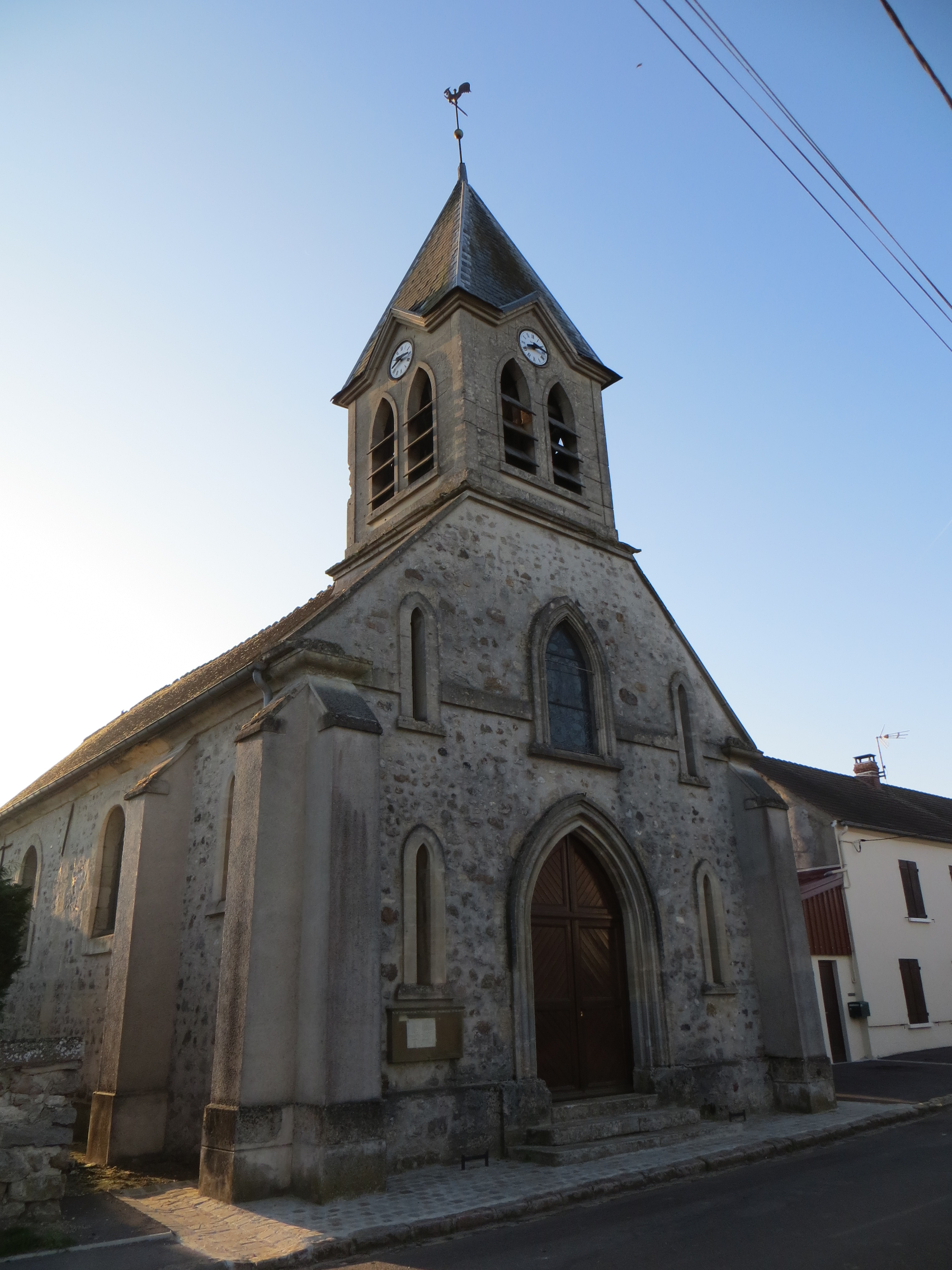 Vue de l'église